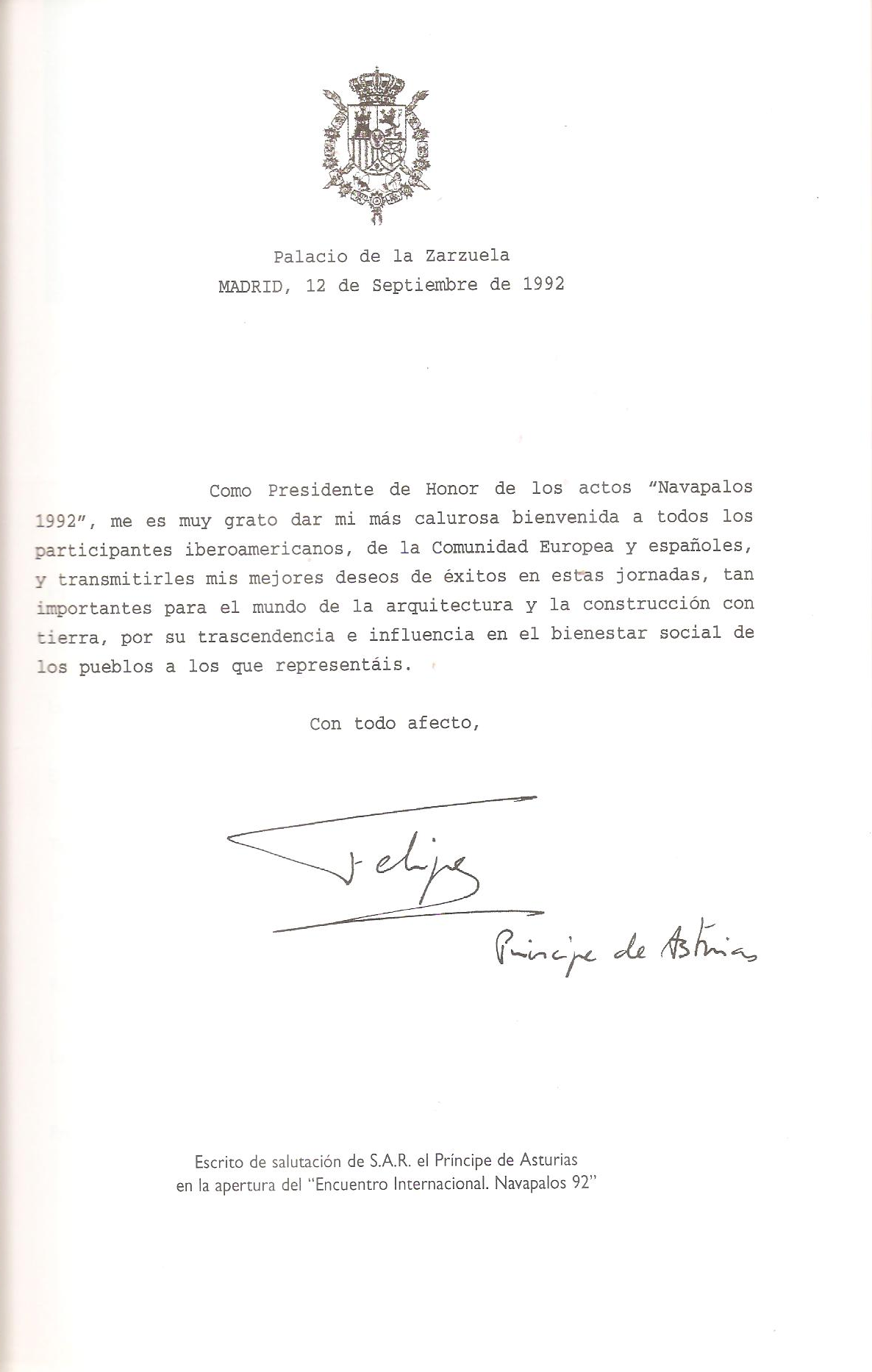 Carta manuscrita letra del rey español S. M. . Felipe VI, entonces príncipe de Asturias, Patronato Encuentro de trabajo en Navapalos 1992